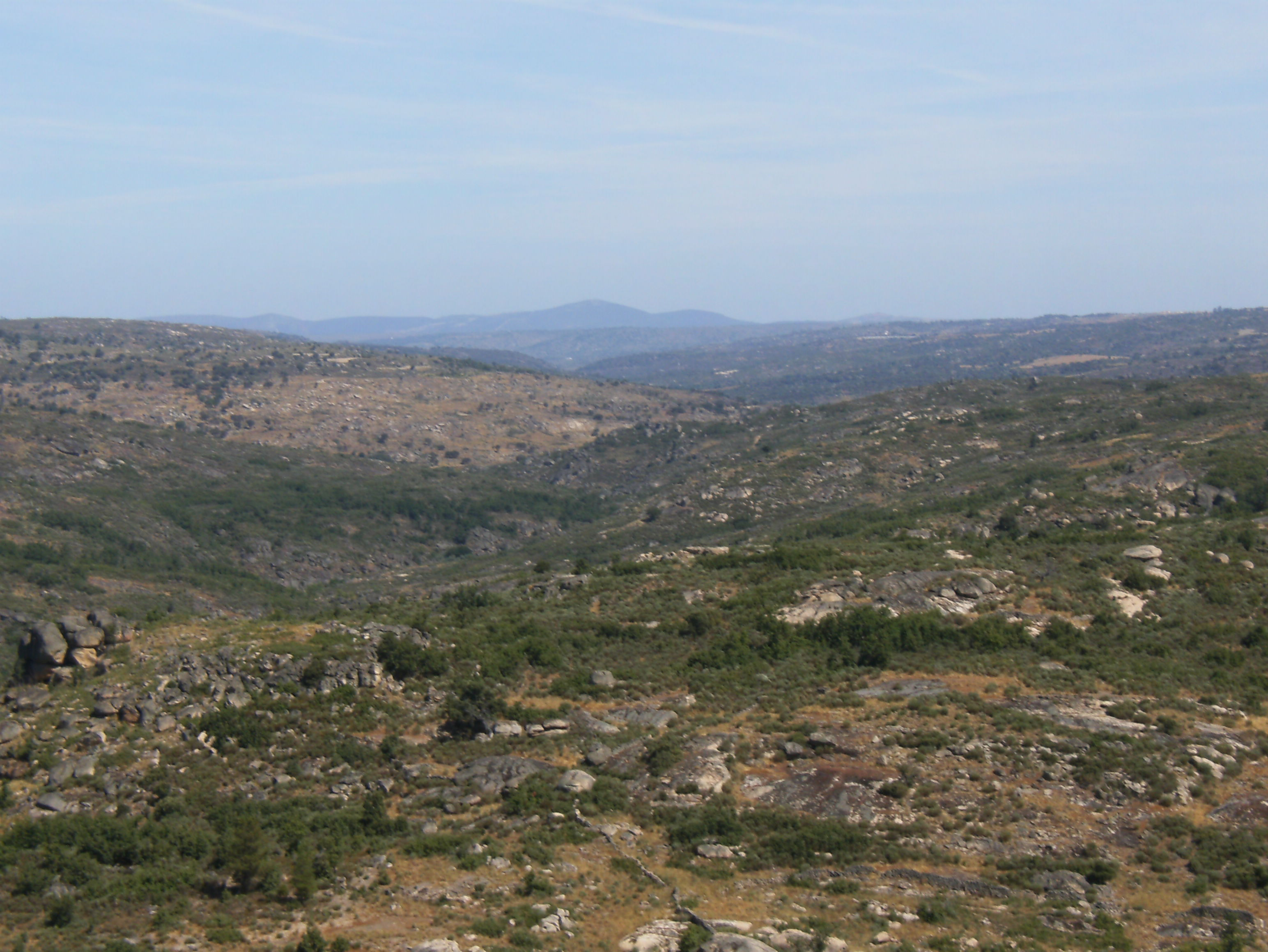 Vista a partir do miradouro de Castelo Bom. Ao fundo, a Serra da Marofa.